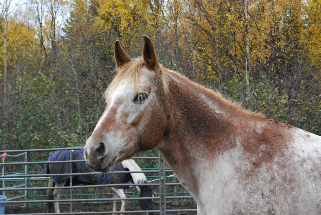 Appaloosa